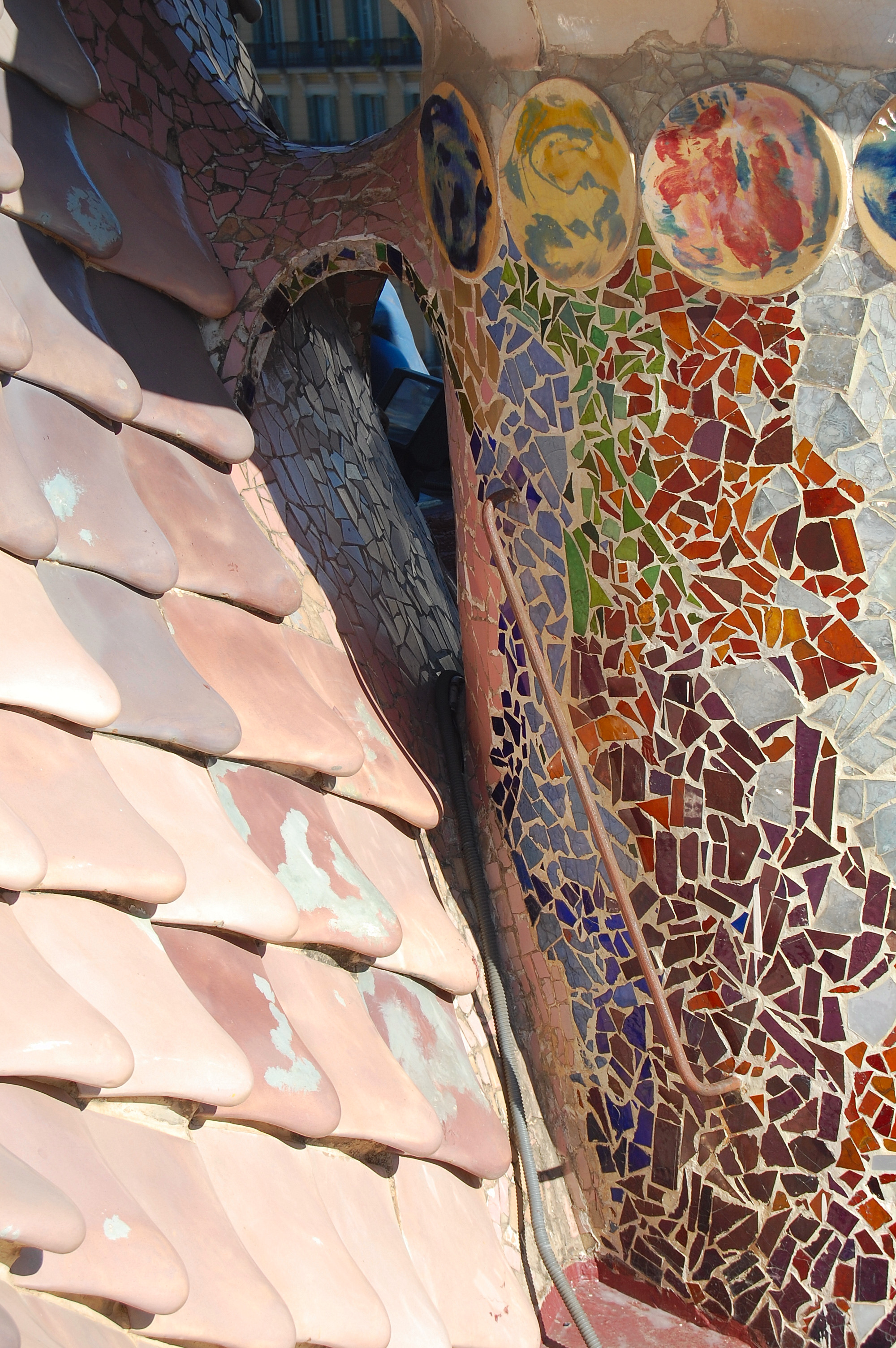 Casa Batlló - Barcellona Antoni Gaudi